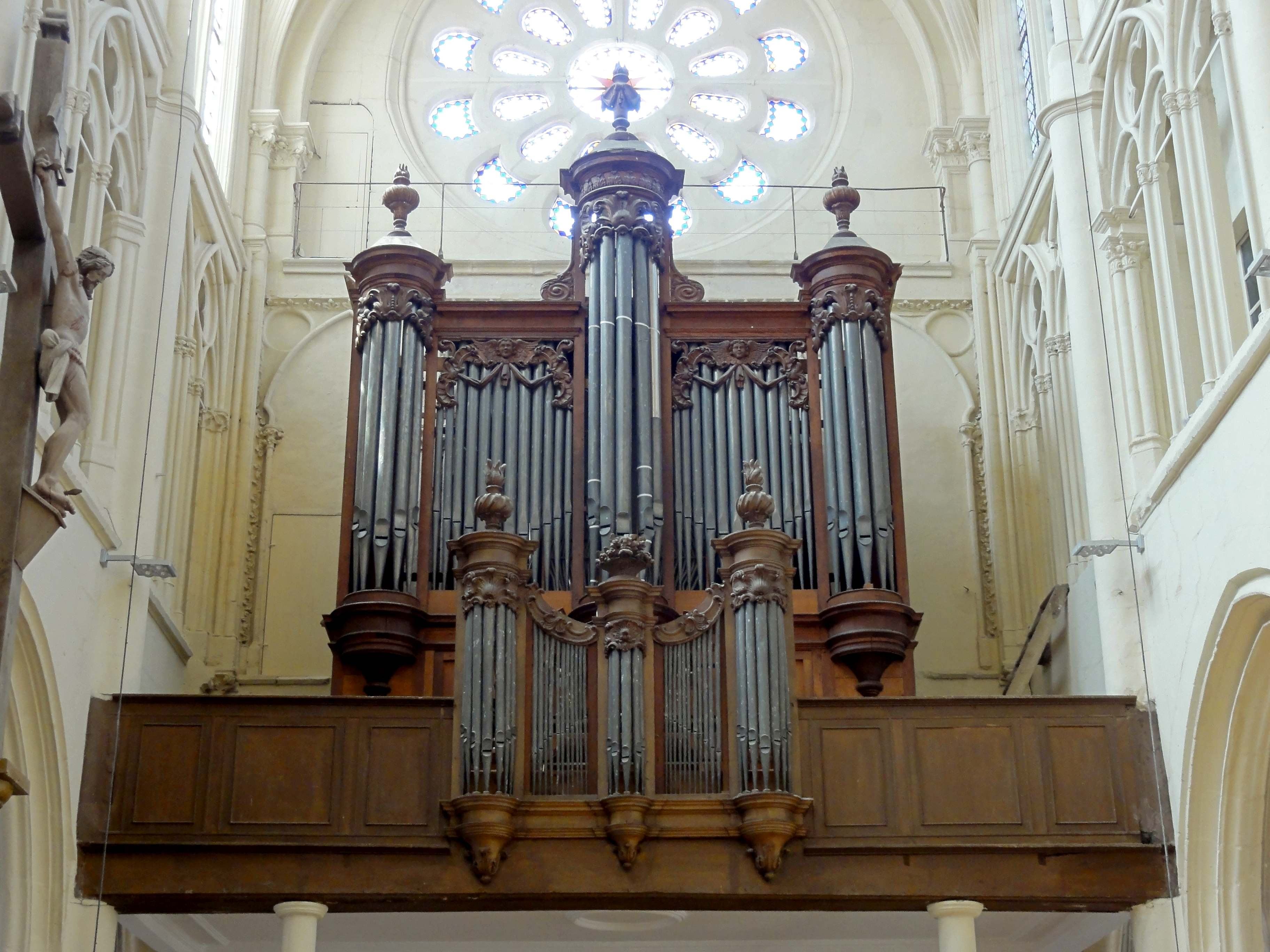 Orgue de tribune.